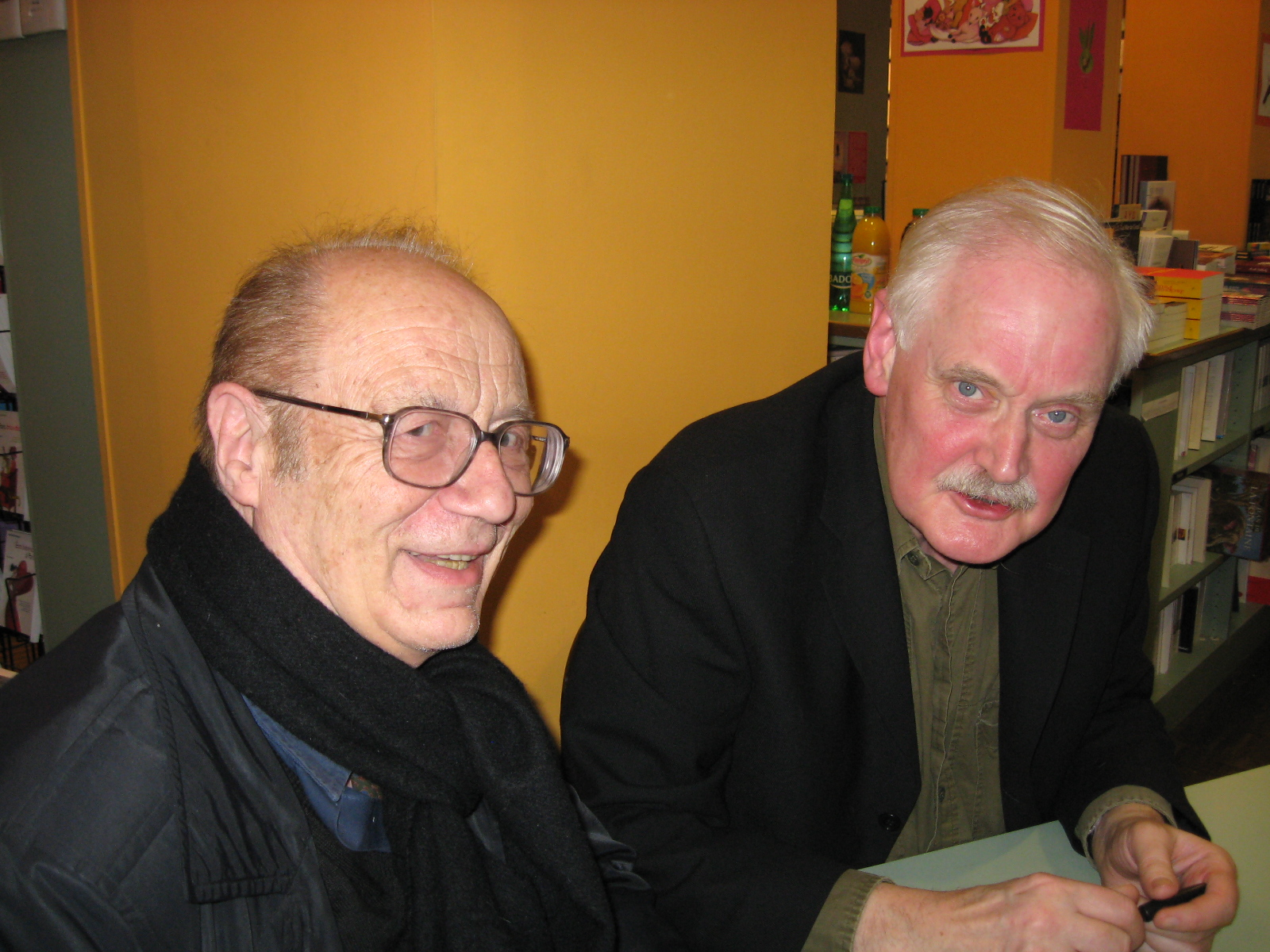 Pierre Bourgeade et Willem en séance de dédicace pour leur ouvrage "Rêves de femmes" (éditions Tristram, 2007)